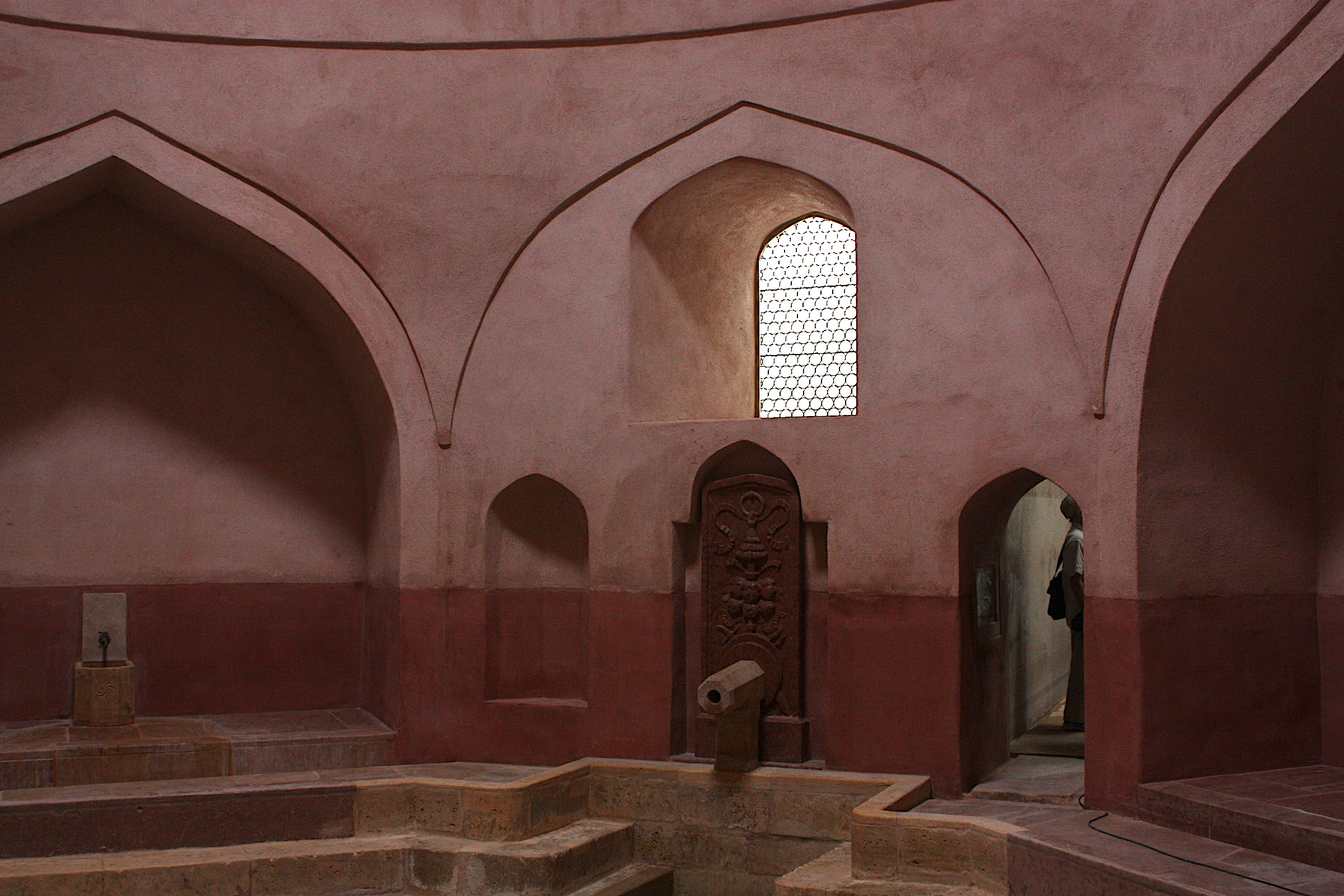 Rácz Fürdő